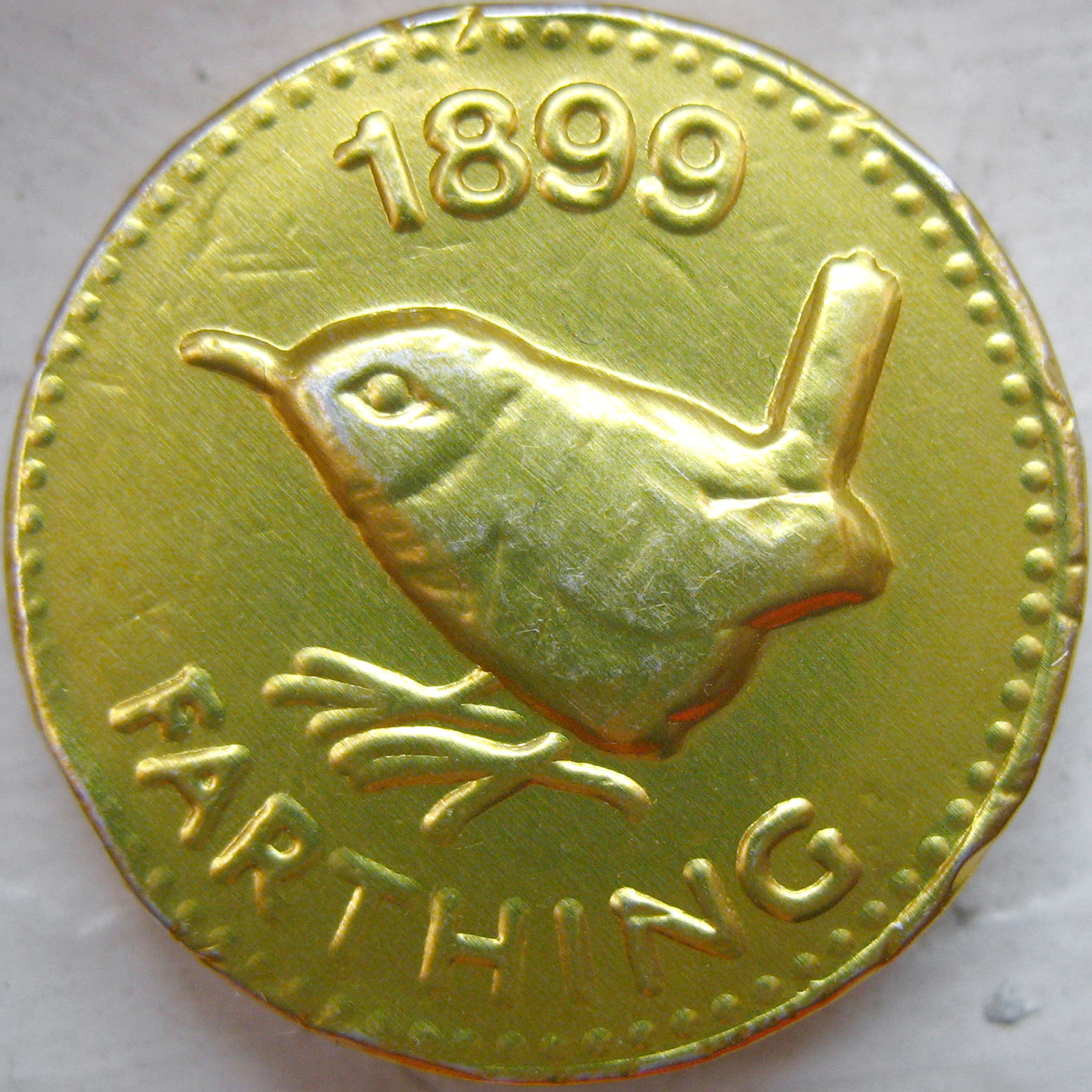 Chokladpeng i metallfolie.